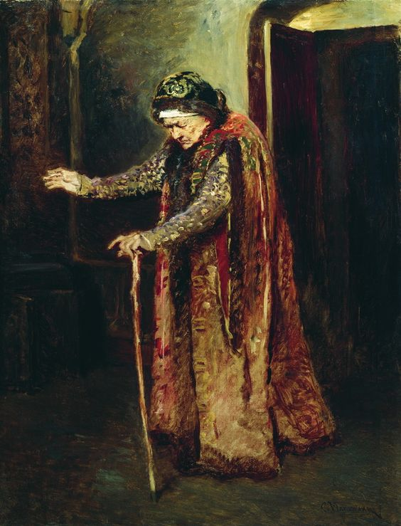 Маковский К. Е. (1839—1915). Нянька Ивана Грозного. Этюд к картине Смерть Ивана Грозного. 1880. Русский музей.